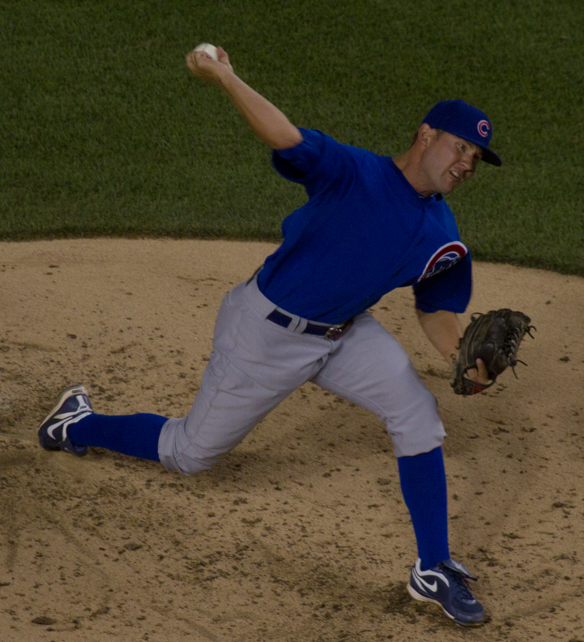 Jaye Chapman